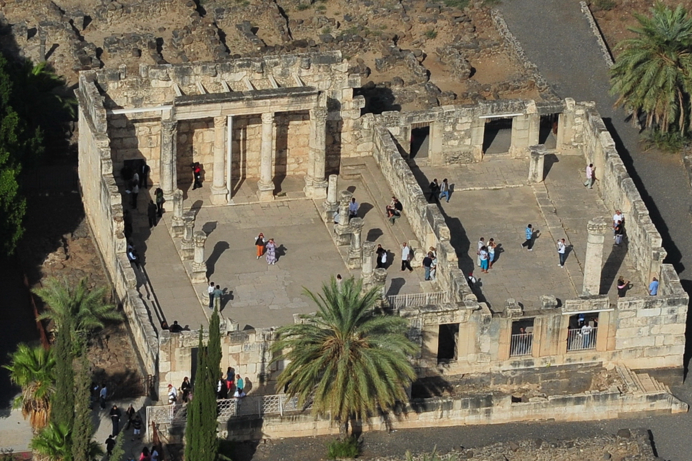 כפר נחום היה יישוב בחופה הצפוני של הכנרת, לא הרחק מכורזים, בבקעת עין שבע. כיום האתר הוא גן לאומי המשתרע על-פני שטח של 80 דונם.